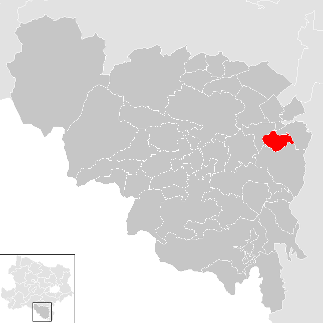 Bezirk Neunkirchen